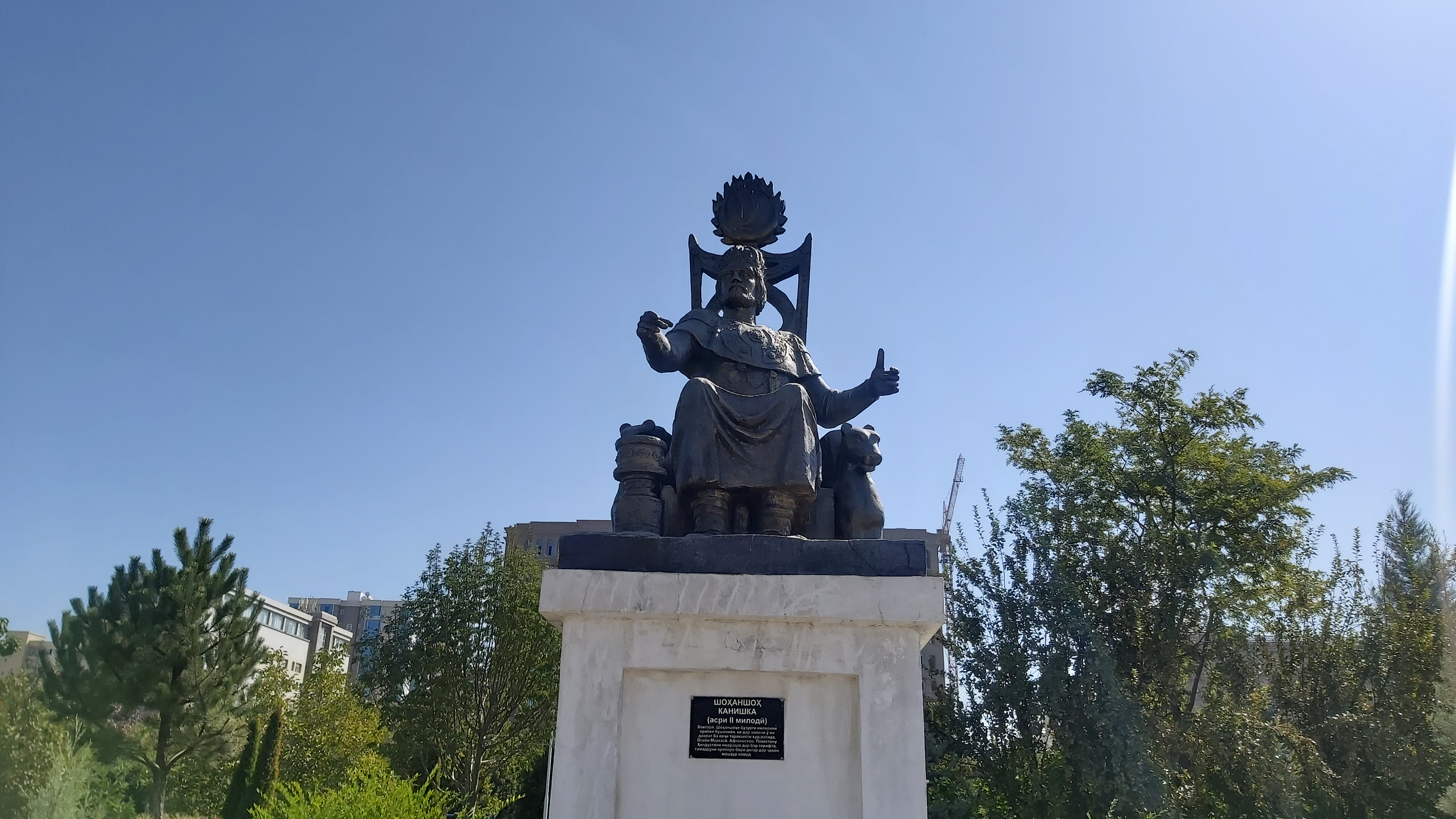 Канишка